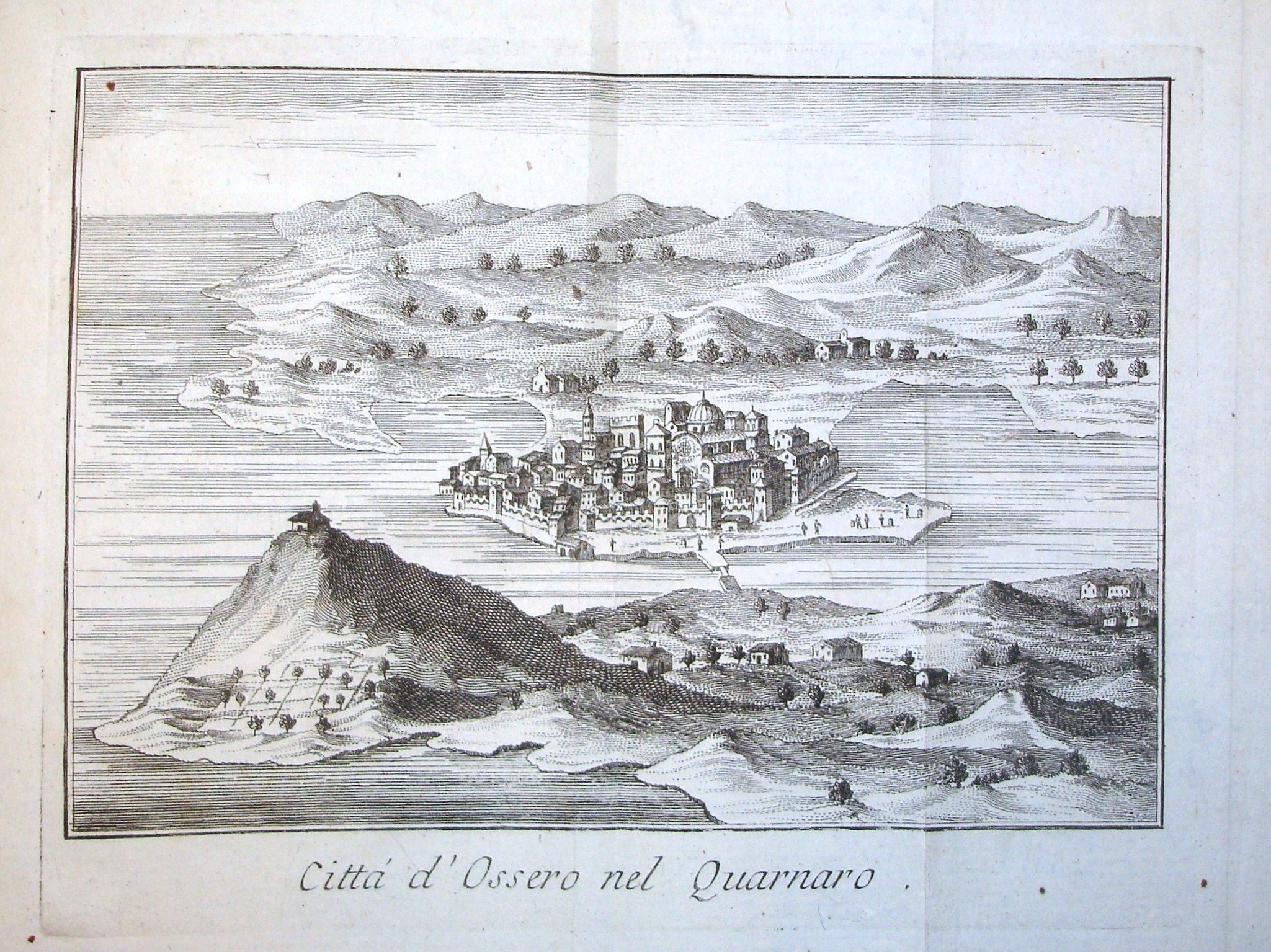 Incisione di Ossero del quarnaro presente nel libro "Topografia Veneta"